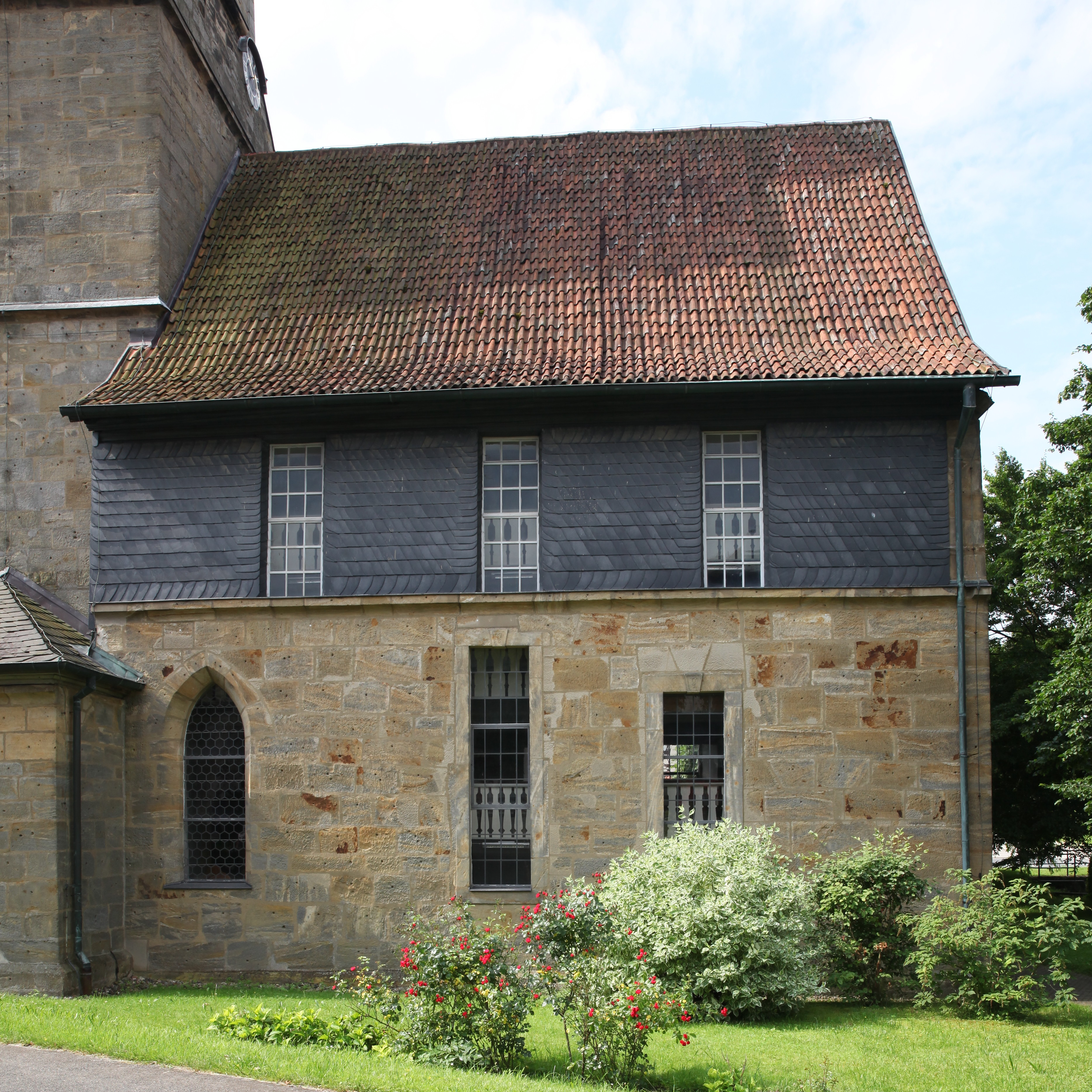 Evangelische Pfarrkirche in Großheirath